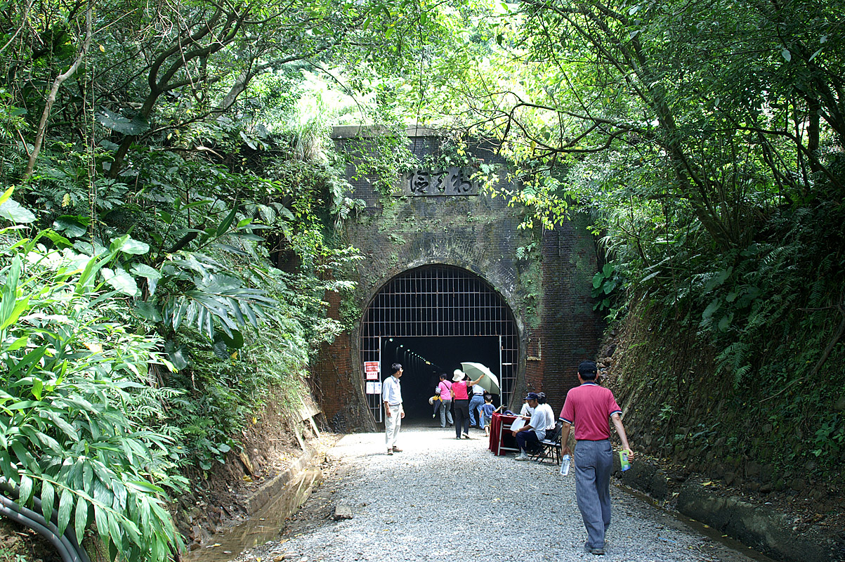 草嶺隧道 Tsaoling Tunnel